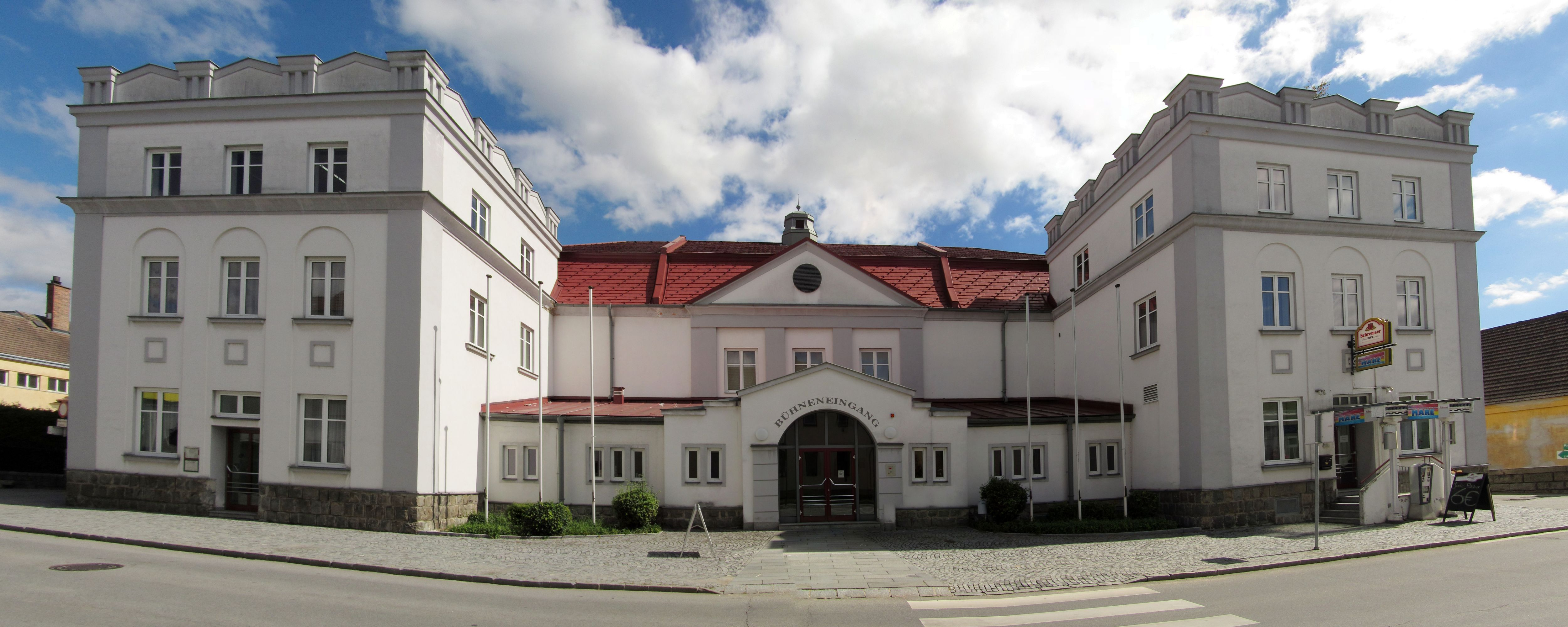 Kulturhaus, ehem. Volksheim